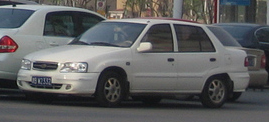 FAW Tianjin Xiali A "Shenya" (Senior)